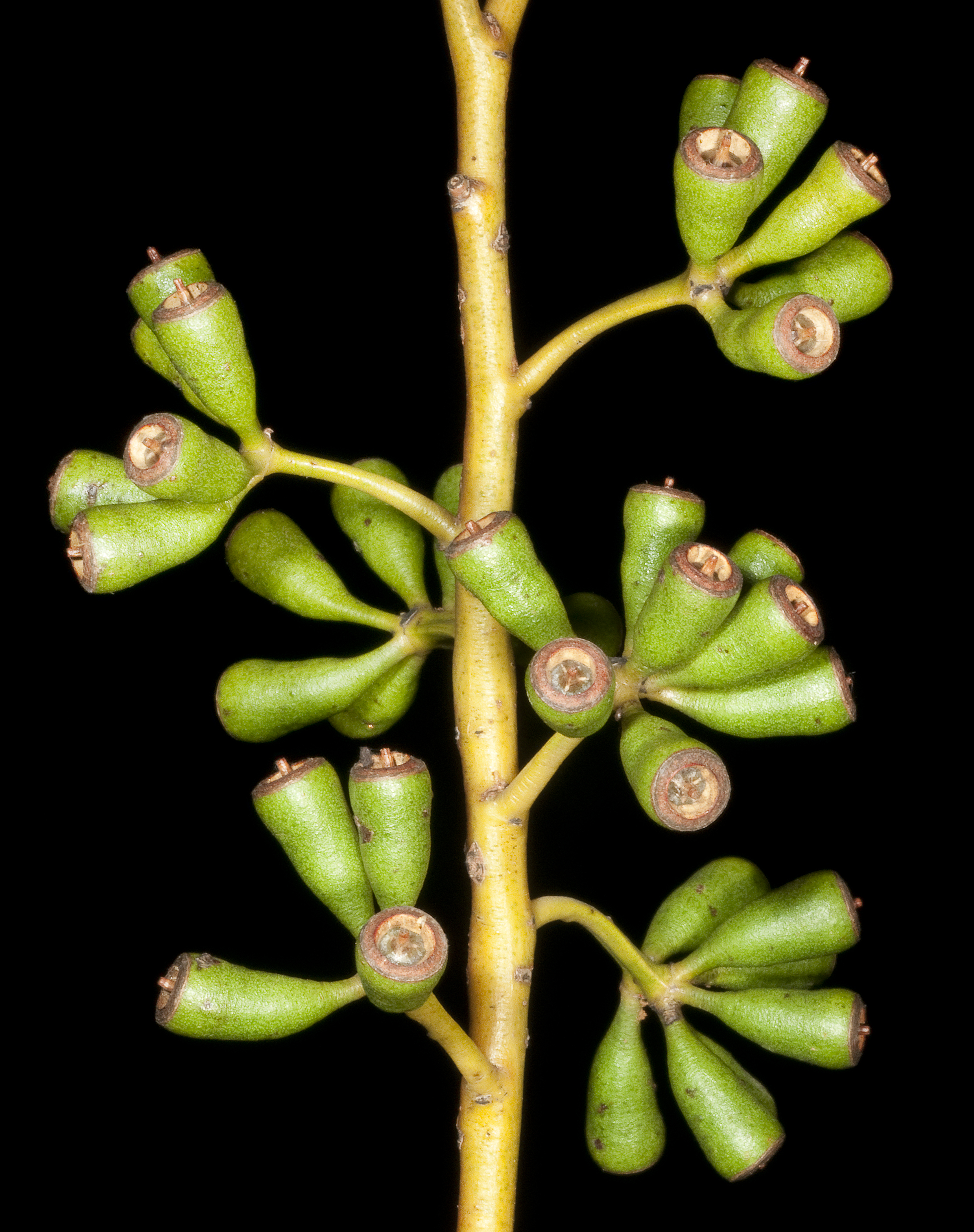 KRT4520